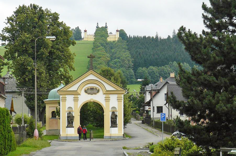 Kraliky (Czechy) - Góra Matki Bożej. Aleja.